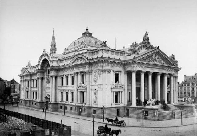 La Bourse, à peine terminée en 1873